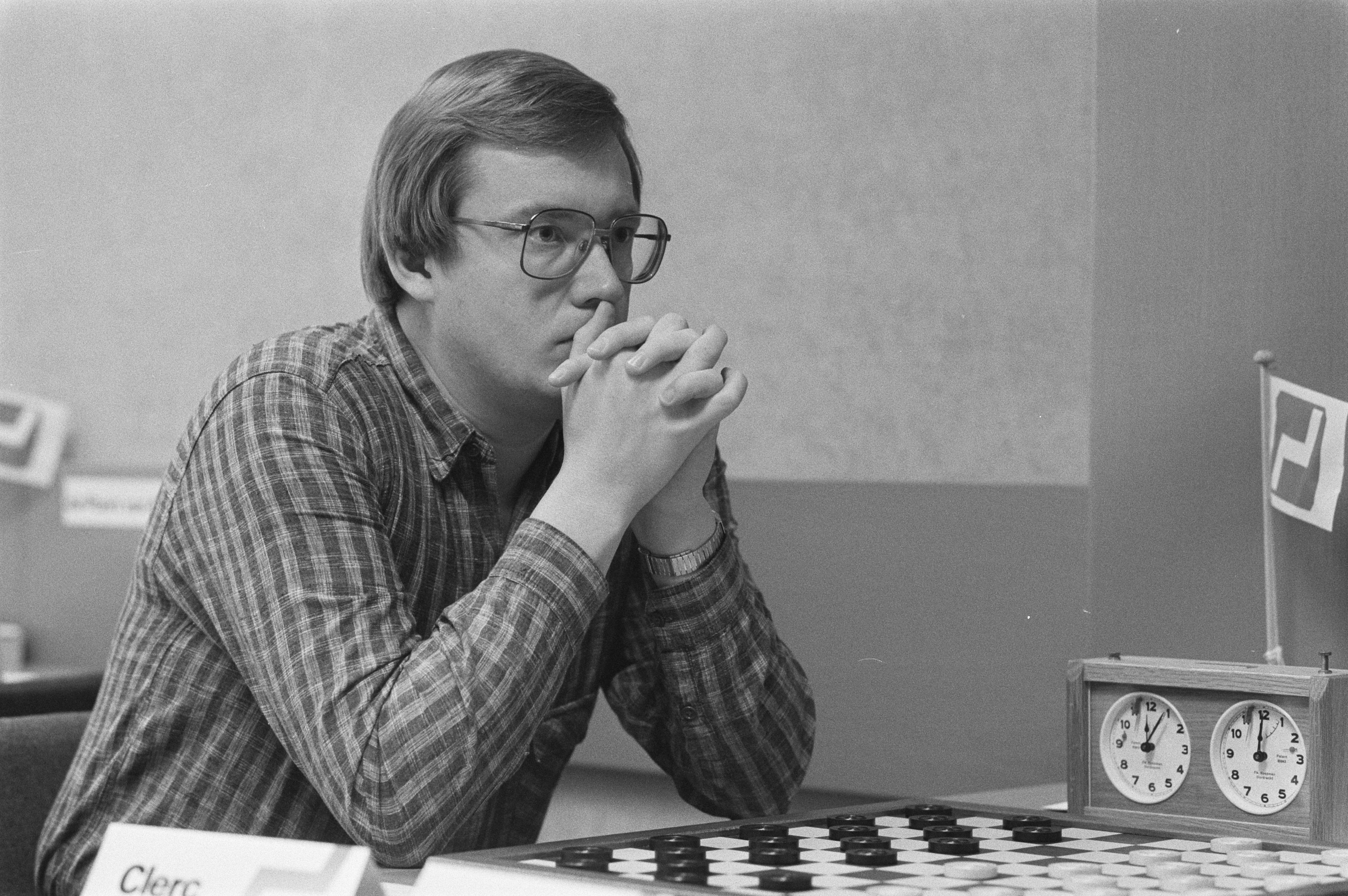 Rob Clerc